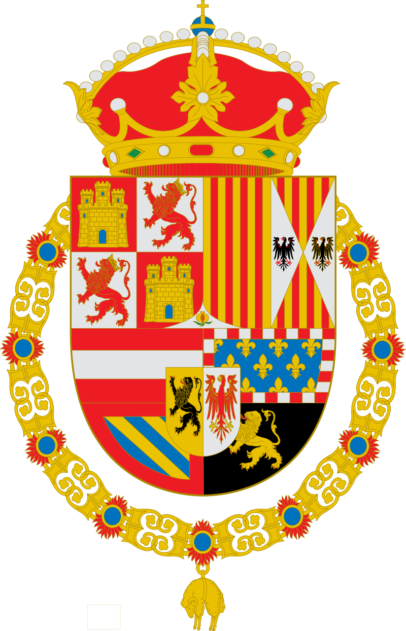 Escudo de Felipe II desde 1556 hasta 1580 y de Carlos II desde 1668 hasta Felipe V